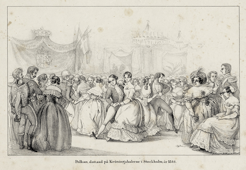 "Polkan, dansad på Kröningsbalerne i Stockholm år 1844". Teckning troligen gjord av Fritz von Dardel.